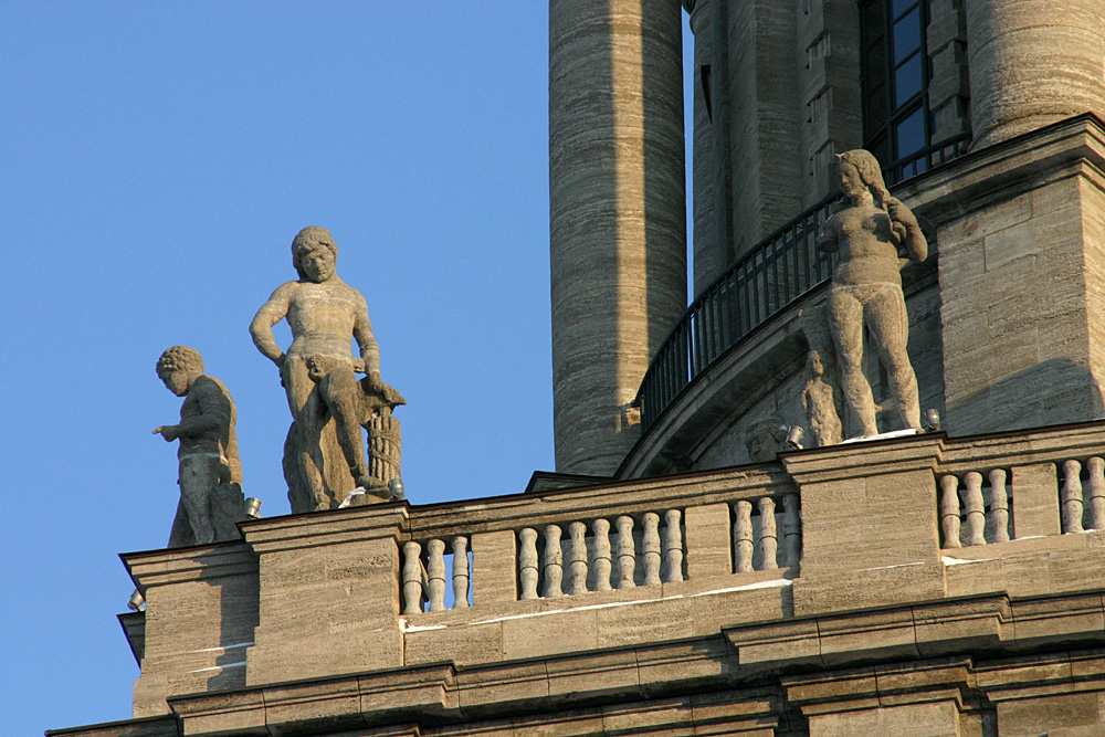 Berlin, Stadthaus, sculptures at the tower - "Bürgertugenden" ("civil virtues") author: Elke Wetzig (elya) date: 2005-12-30